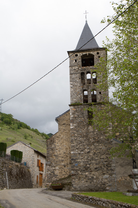 Eglise de Caussou